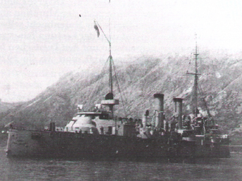 k.u.k. Cruiser SMS Kaiser Franz Joseph I. (1906)